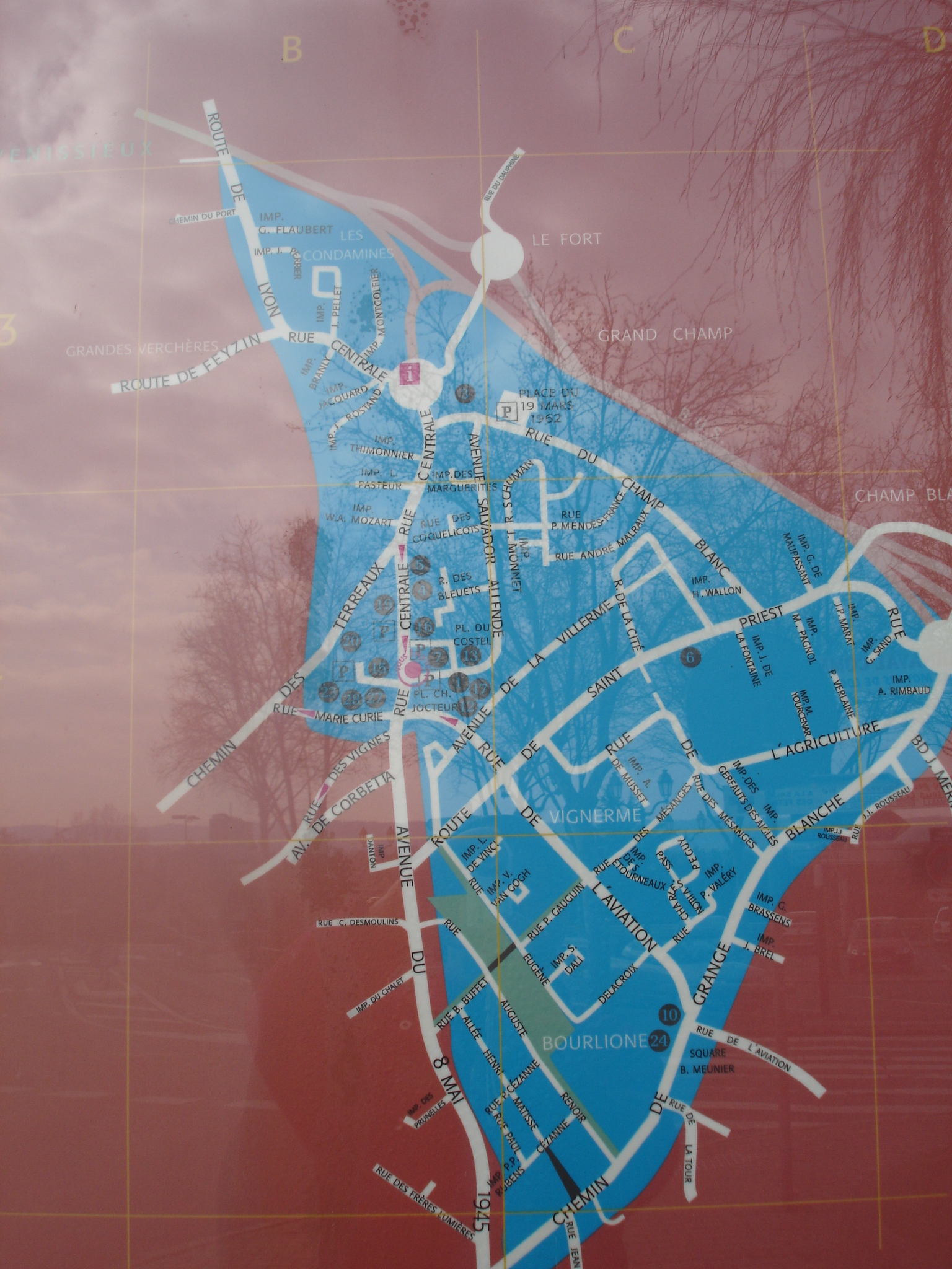 Corbas : plan du village